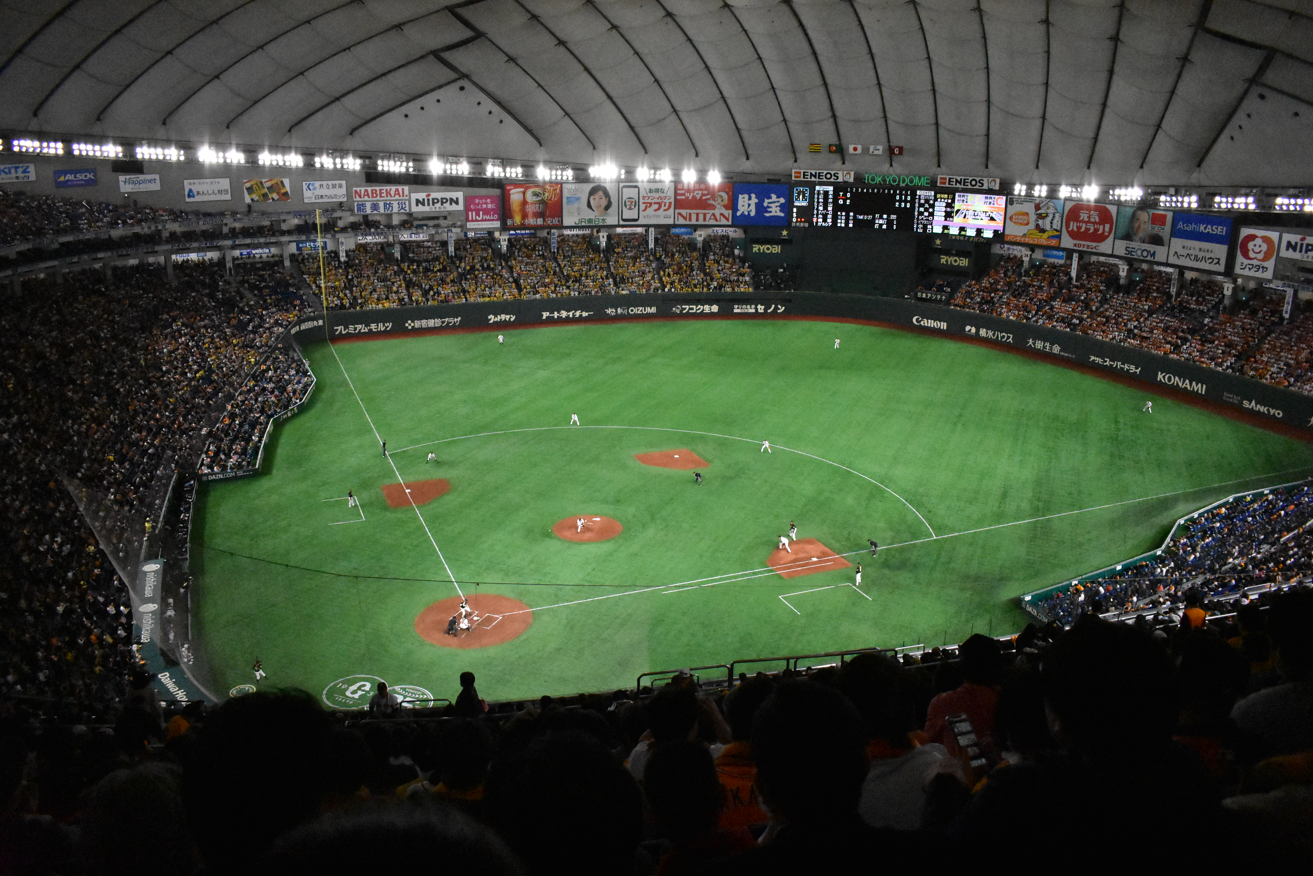 東京ドーム Nikon D3400